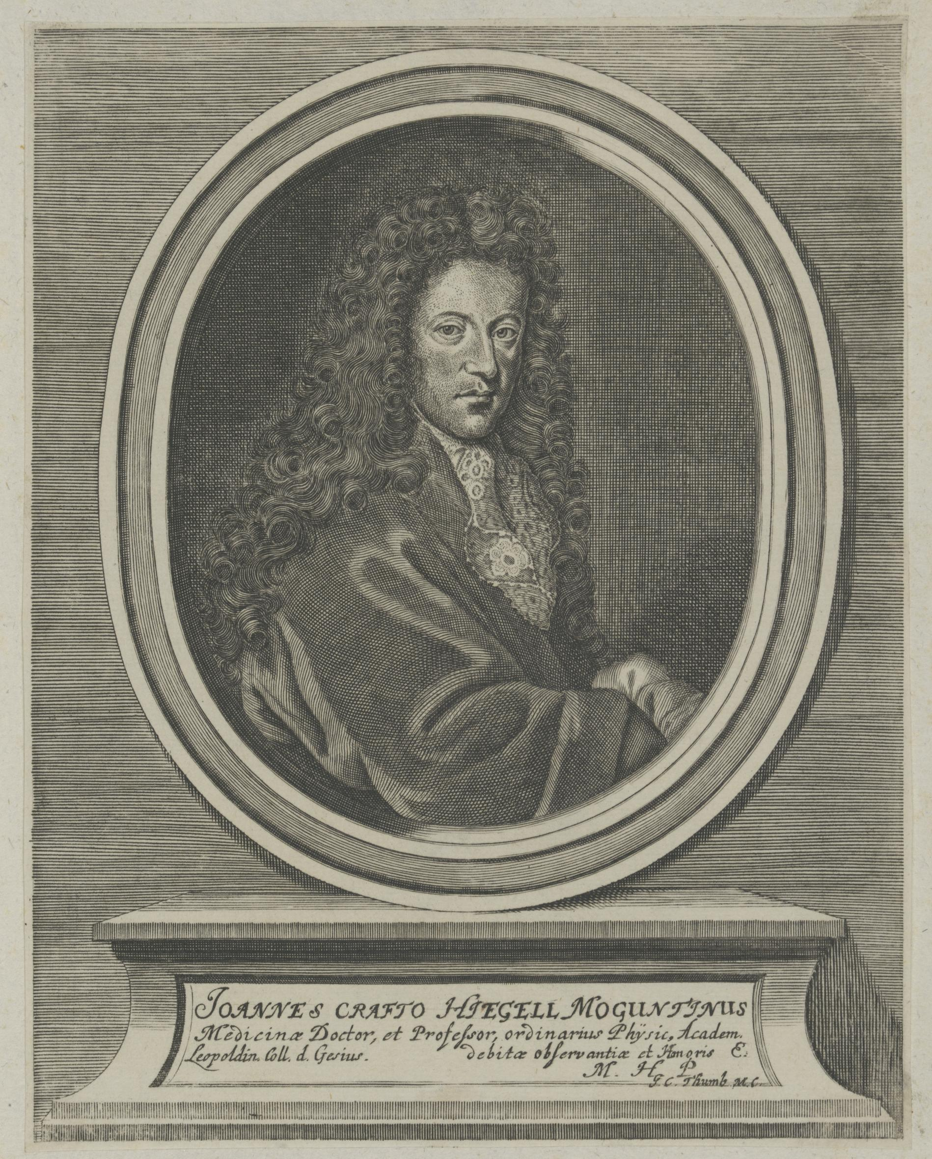 Bildnis des Johann Crafto Hiegel 1720/1750 Kupferstich 190 x 148 mm (Blatt); - (Platte) Nürnberg, Germanisches Nationalmuseum, Graphische Sammlung (Paul Wolfgang Merkel'sche Familienstiftung), Inventar-Nr. MP 10772, Kapsel-Nr. 182